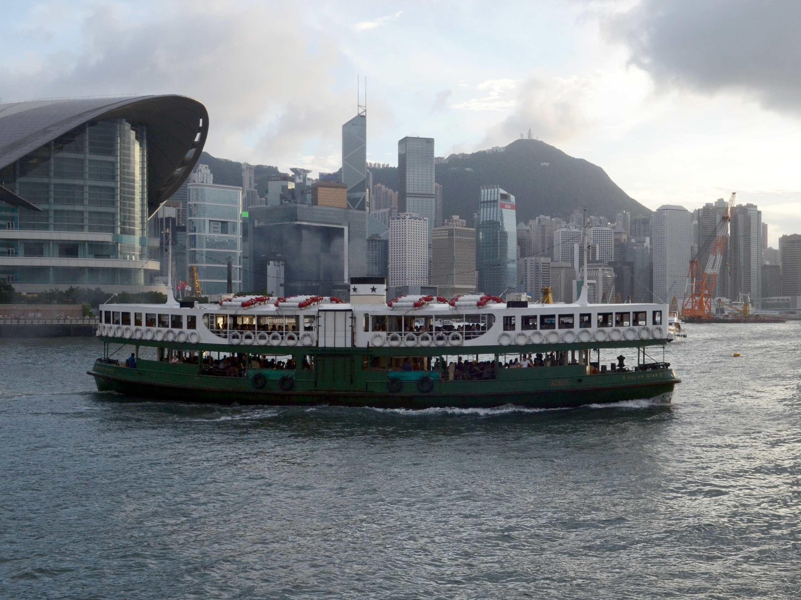 日星（Solar Star）